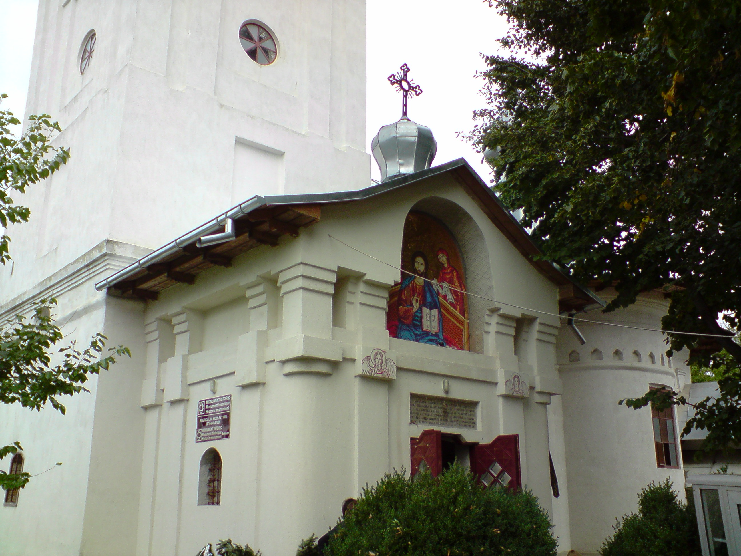 Biserica Sfantul Nicolae